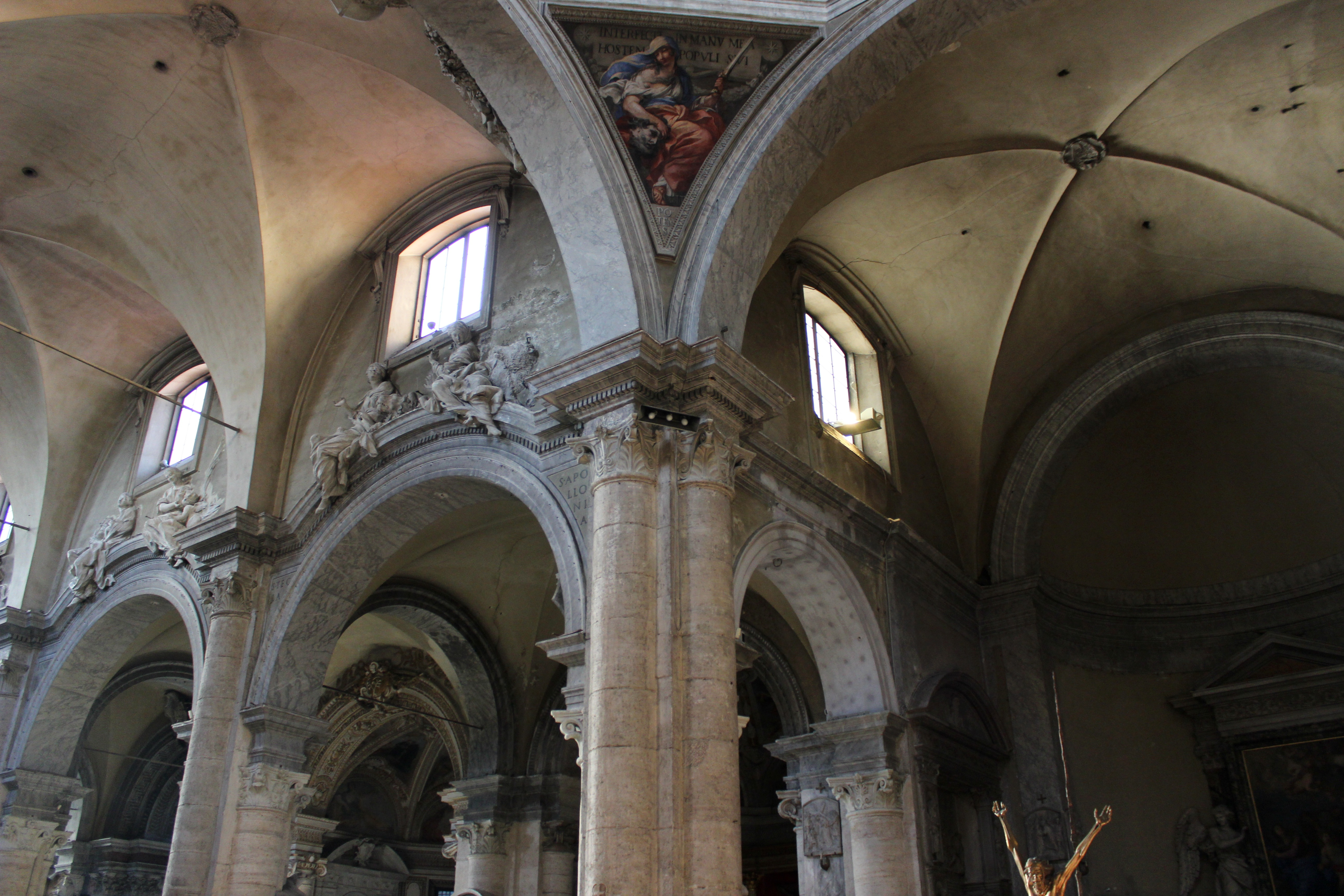 Roma. Santa Maria del Popolo. Interior.